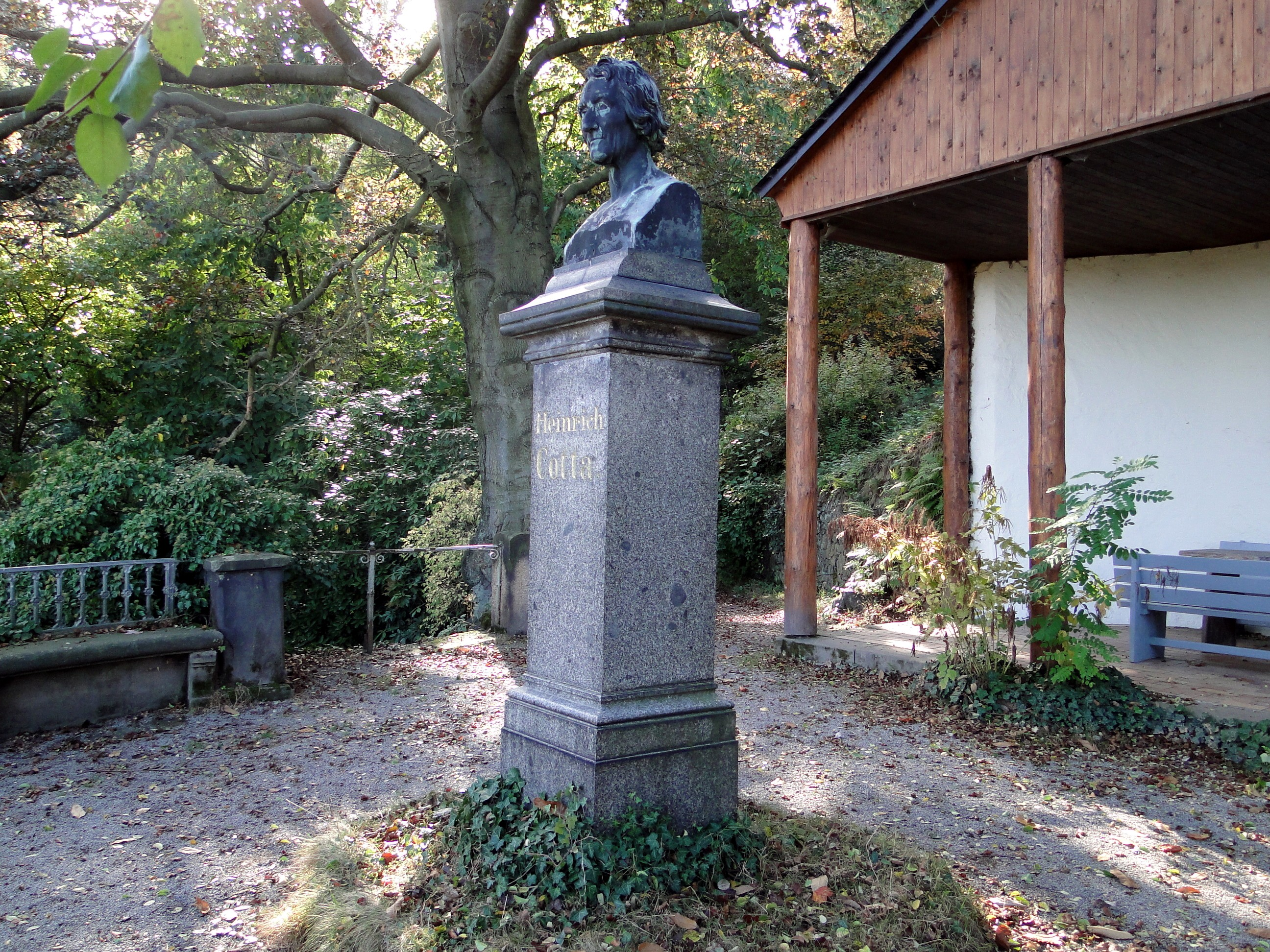 Büste von Heinrich Cotta im Forstbotanischen Garten Tharandt, geschaffen von Ernst Rietschel